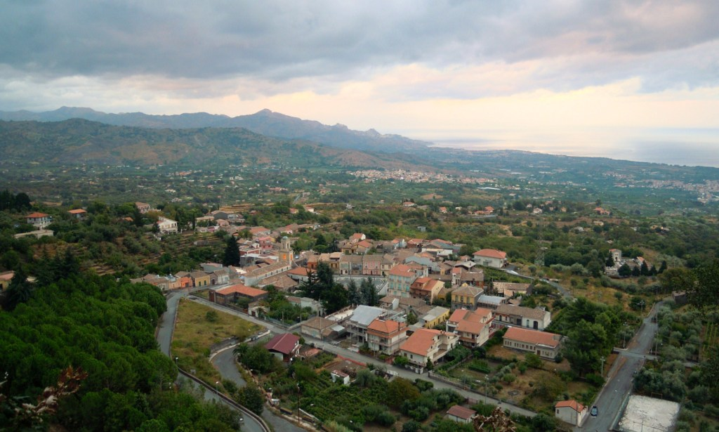 Presa, Piedimonte Etneo (CT), panorama